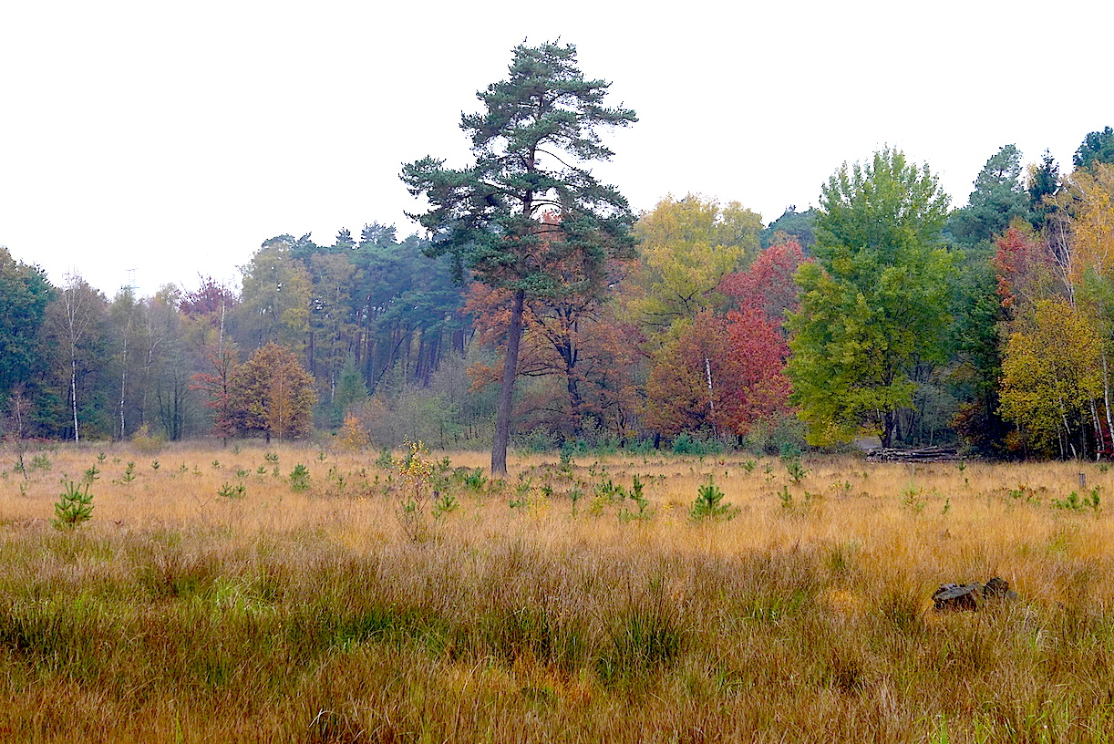 "Тропа Клинка" - туристский маркированнный маршрут вокруг немецкого города Золинген (Северный Рейн-Вестфалия). Восьмой этап: между Вуппером и Иттером. 7.2 км.